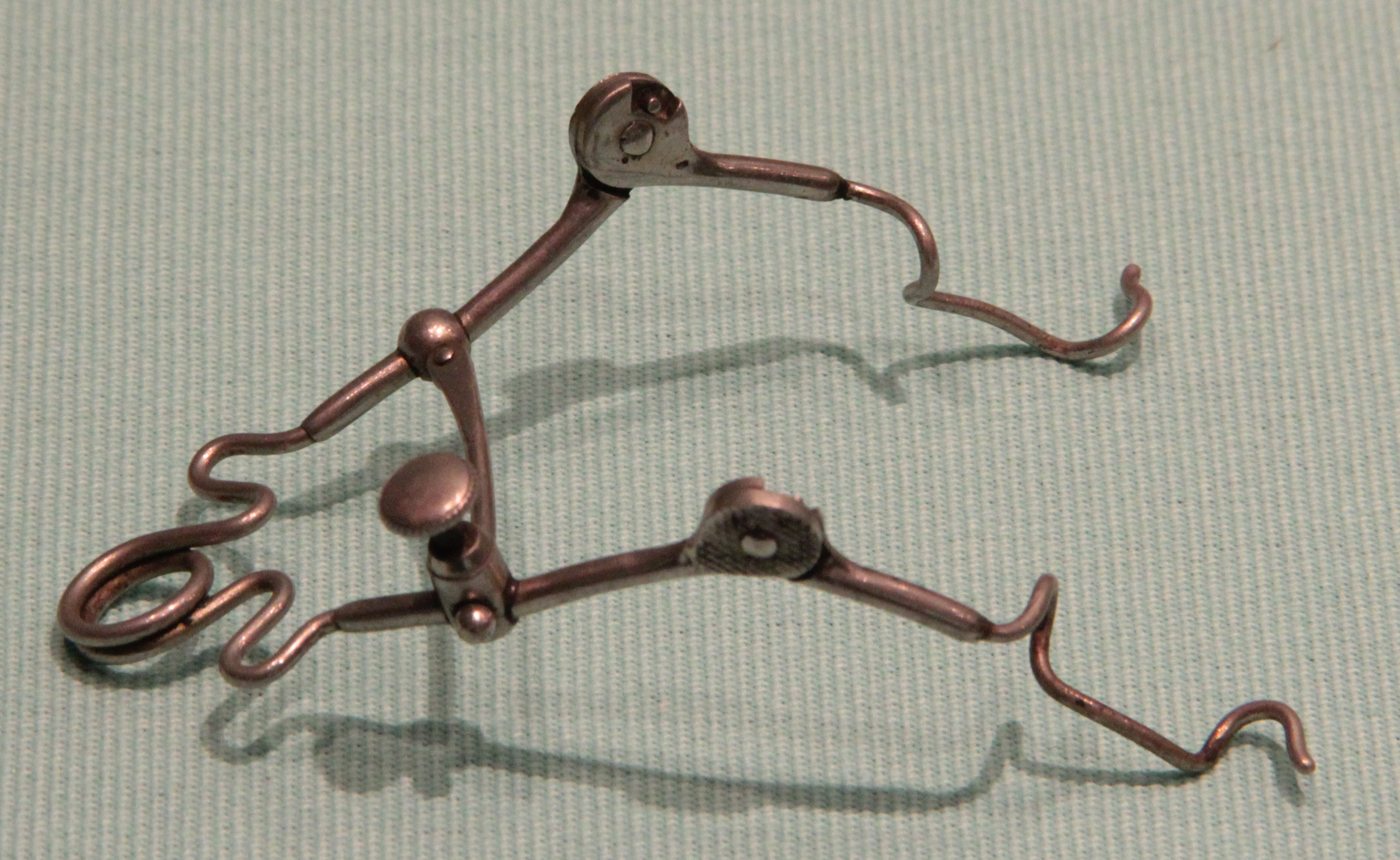 Blépharostat, ou écarteur à paupières. Début XXè. Musée des Instruments de médecine des Hôpitaux de Toulouse Native nameMusée des Instruments de Médecine des Hôpitaux de ToulouseParent institutionHôpitaux de ToulouseLocationToulouse, FranceCoordinates43° 35′ 57″ N, 1° 26′ 11″ E Authority control : Q3330252